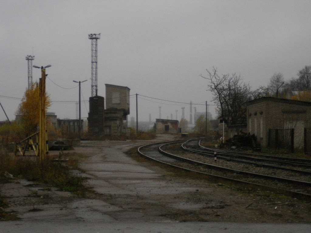 Vaade Telliskivi tänava raudteeülesõidult Kopli kaubajaama suunas põhjas.